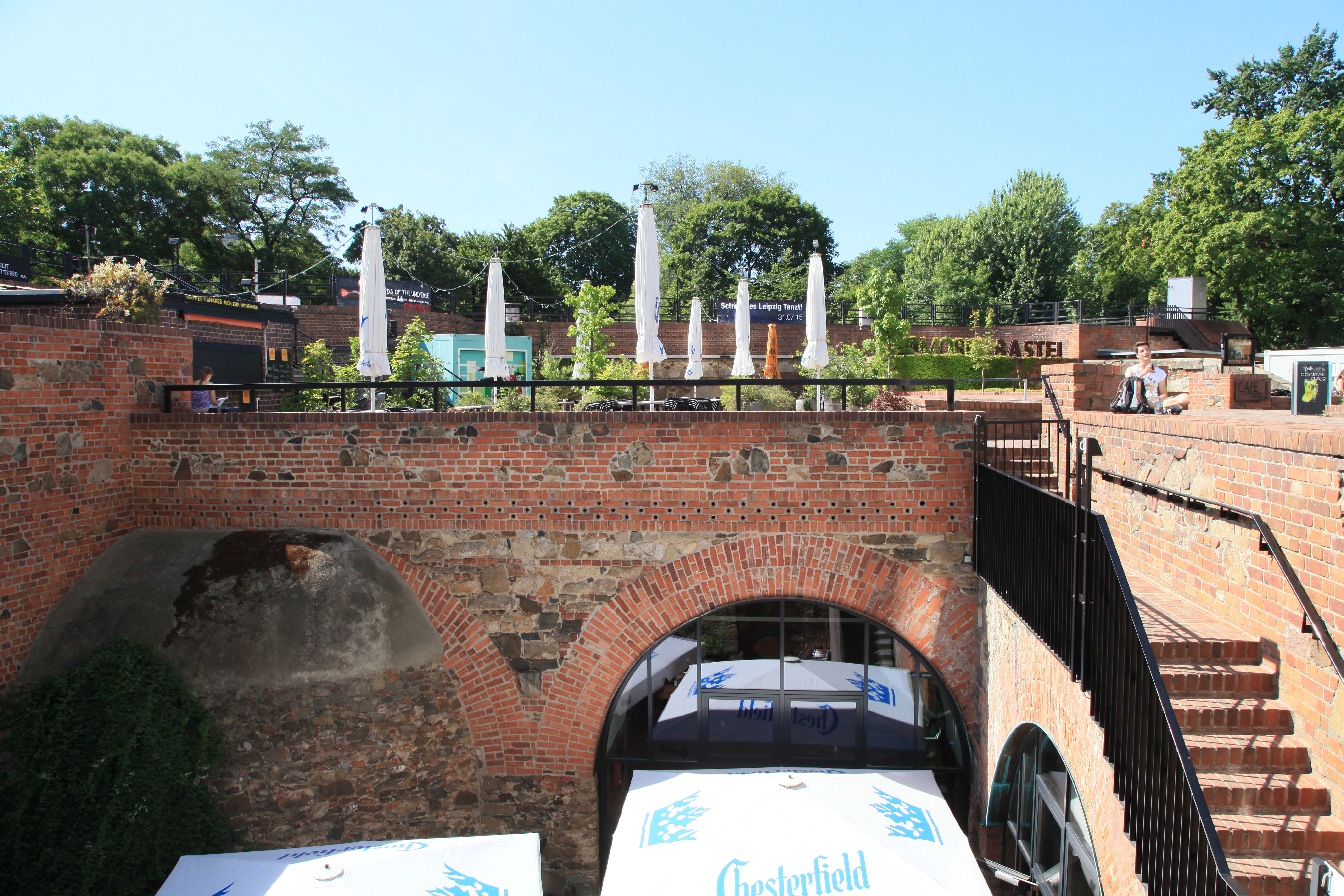 Moritzbastei, Universitätsstraße in Leipzig